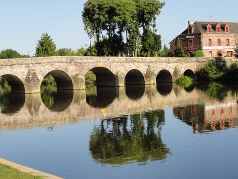 pont se refletant dans la vilaine